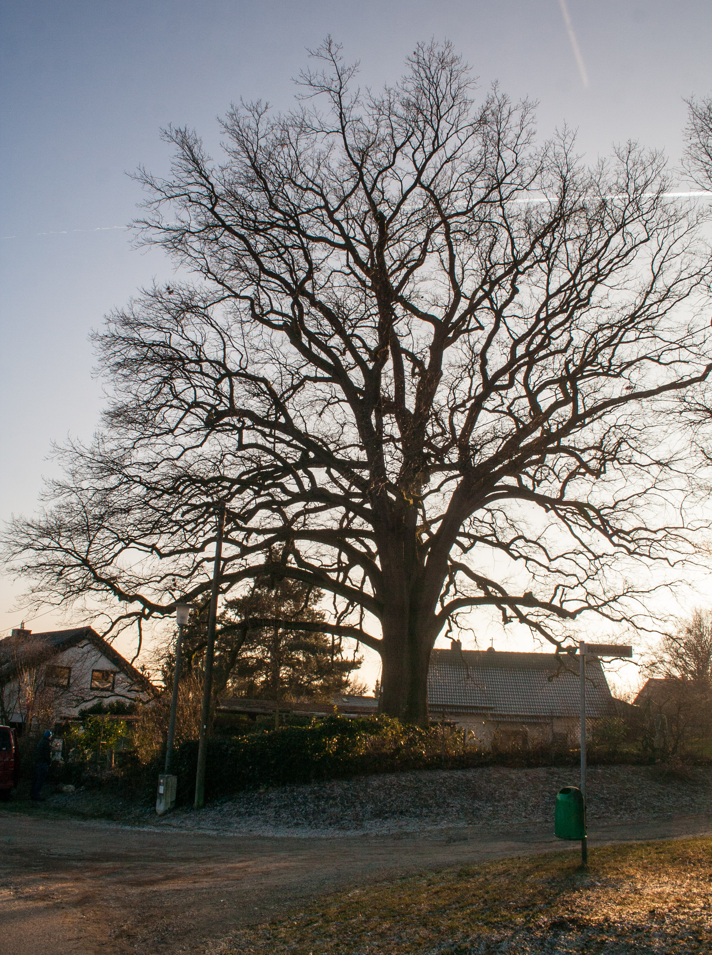 Unterhaidelsbacher Huteiche, Naturdenkmal, Unterhaidelbach, Leinburg